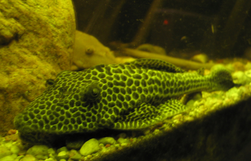 Beschreibung: Harnischwels (Loricariidae) Fotograf: Darkone, 23. September 2004